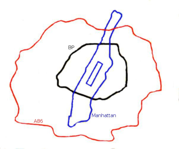 Manhattan comparé à Paris et sa petite couronne